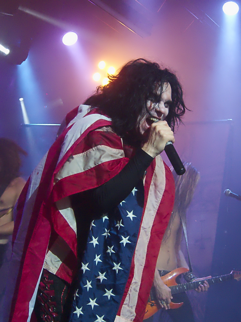 Lizzy Borden actuando en Helsinki en 2011.